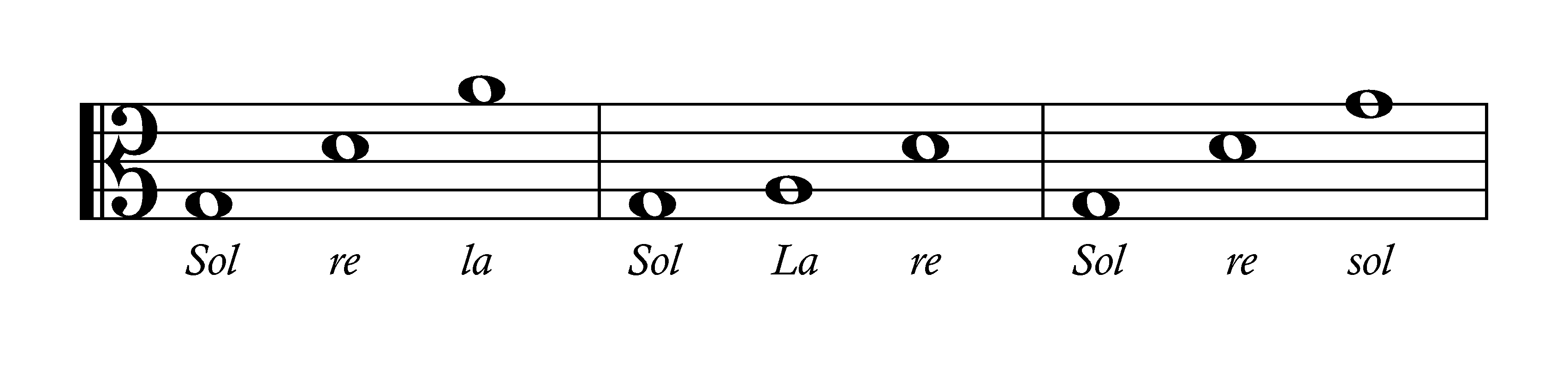 Imaginea prezintă câteva acordaje de braci (violă), mai răspândite în estul Transilvaniei, observate de folcloristul Gheorghe Oprea. Se observă utilizarea a doar trei corzi.